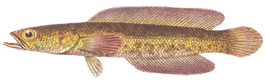 Channa cyanospilos after Bleeker 1878